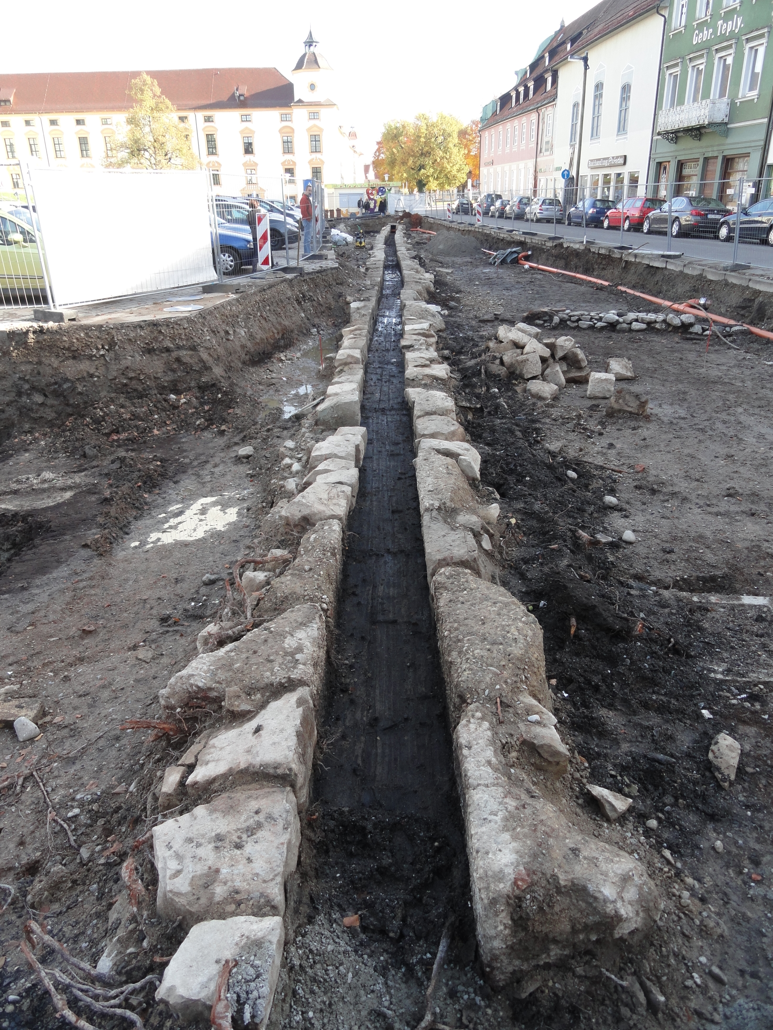 Archäologische Ausgrabung am Hildegardplatz in Kempten, "Kanal" hier ist der Schlangenbach. Seit den 1960ern durch den Bau des Mittleren Rings stillgelegt.